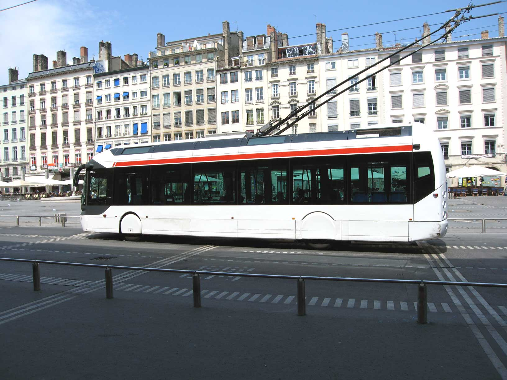 Trolleybus près sur la place des Terreaux à Lyon (bandes blanches et fontaines de Daniel Buren sur le sol), Lyon, France